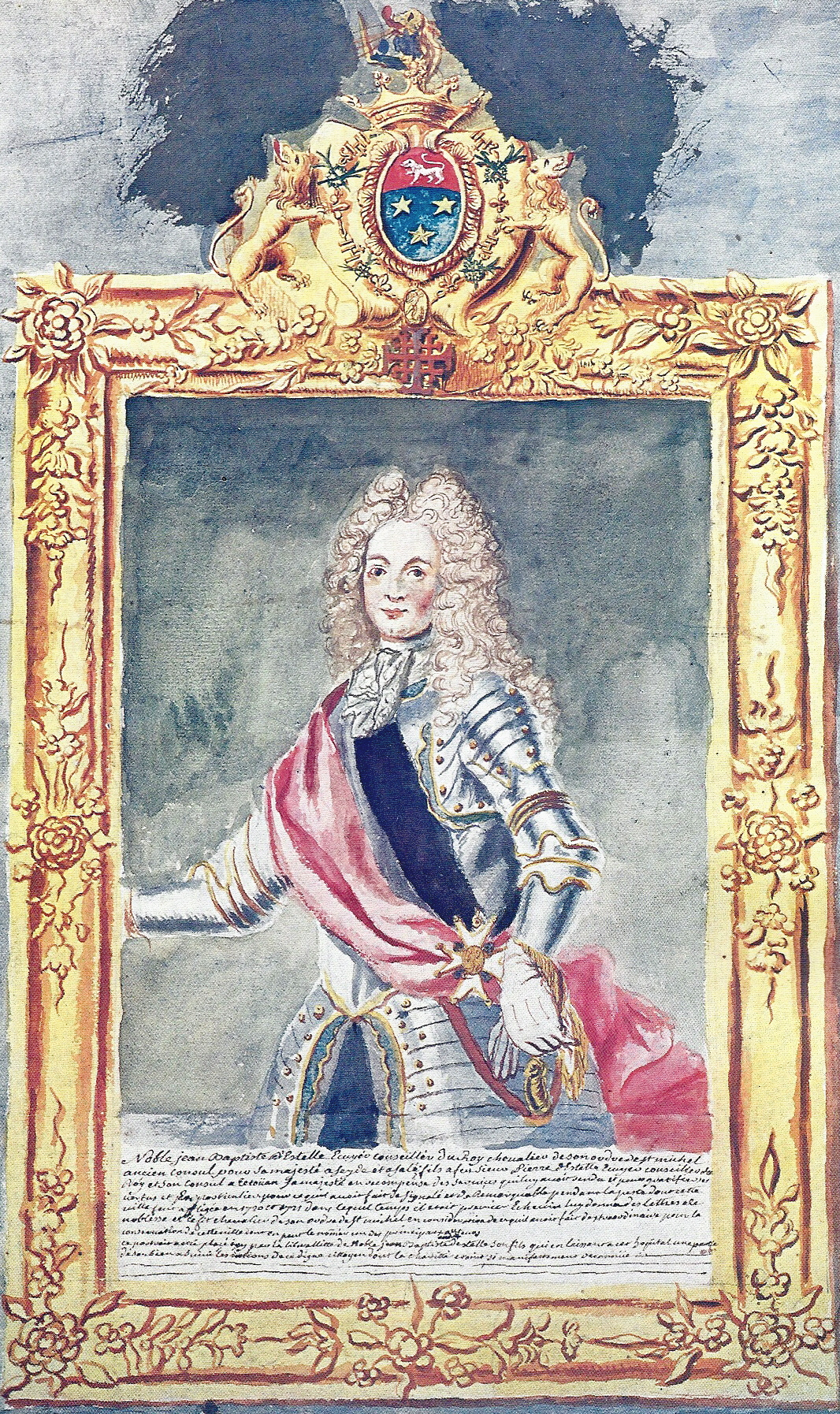 Portrait réalisé vers 1750 de l'échevin Estelle, premier échevin de Marseille durant le grande peste de 1720.